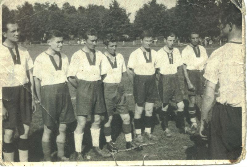 Drużyna Olimpii Elbląg, czerwiec 1945, boisko przy Agrykola 8 w Elblągu